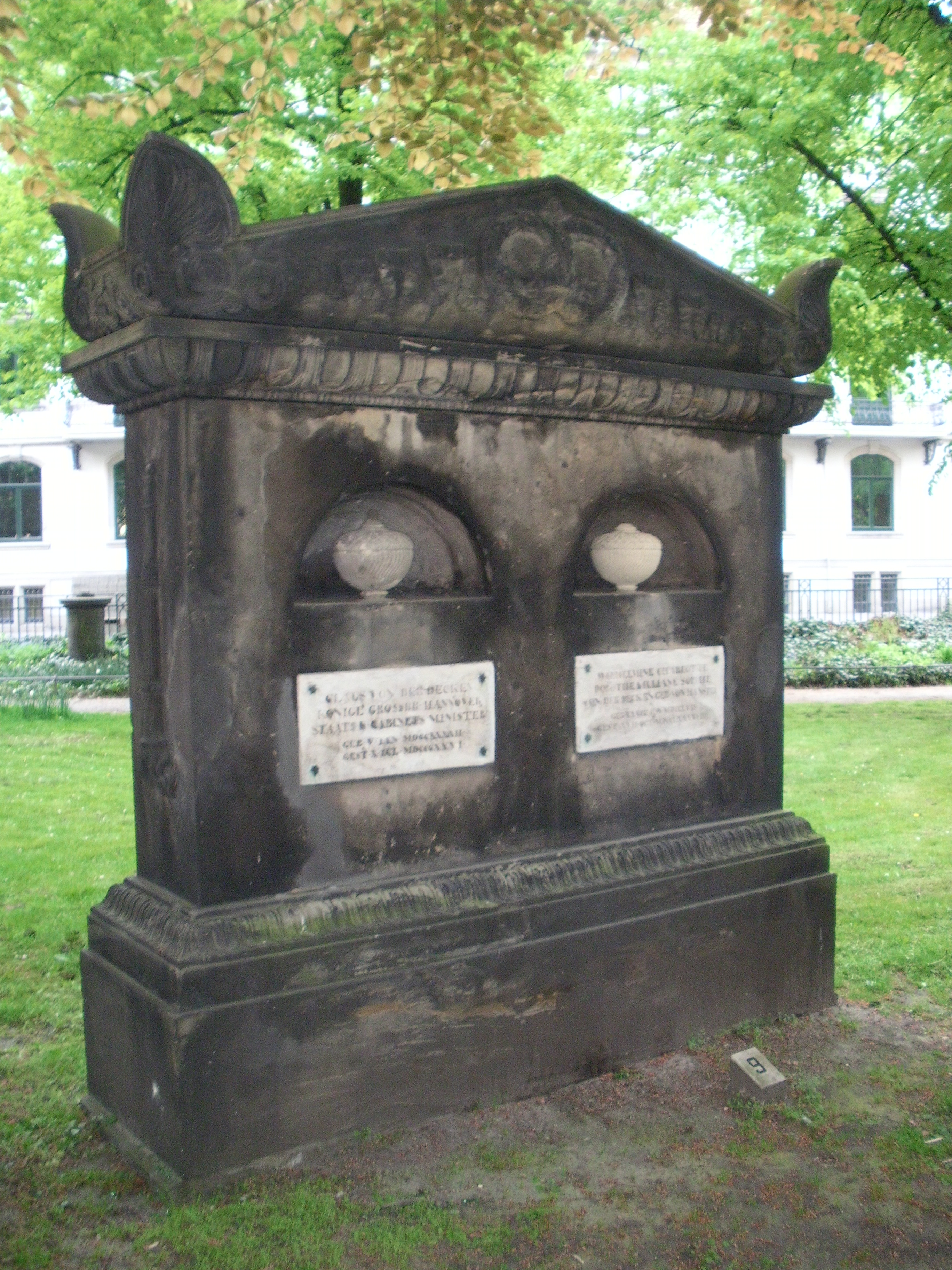 Grabmal des hann. Staats- und Kabinettsmnisters Claus von der Decken (1742-1826)